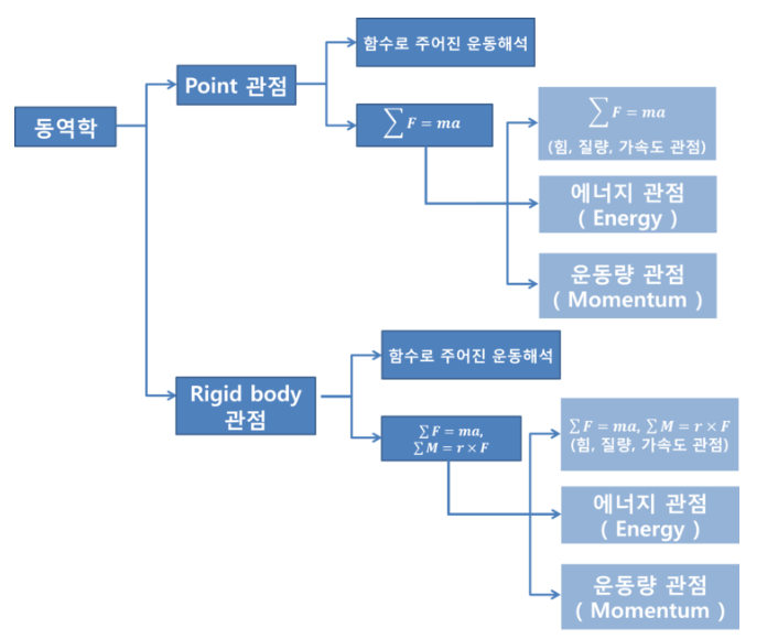 한 내용으로 동역학을 point관점과 Rigid body관점에서 세부적으로 나타낸 것을 도식적으로 보여주는 표이다.